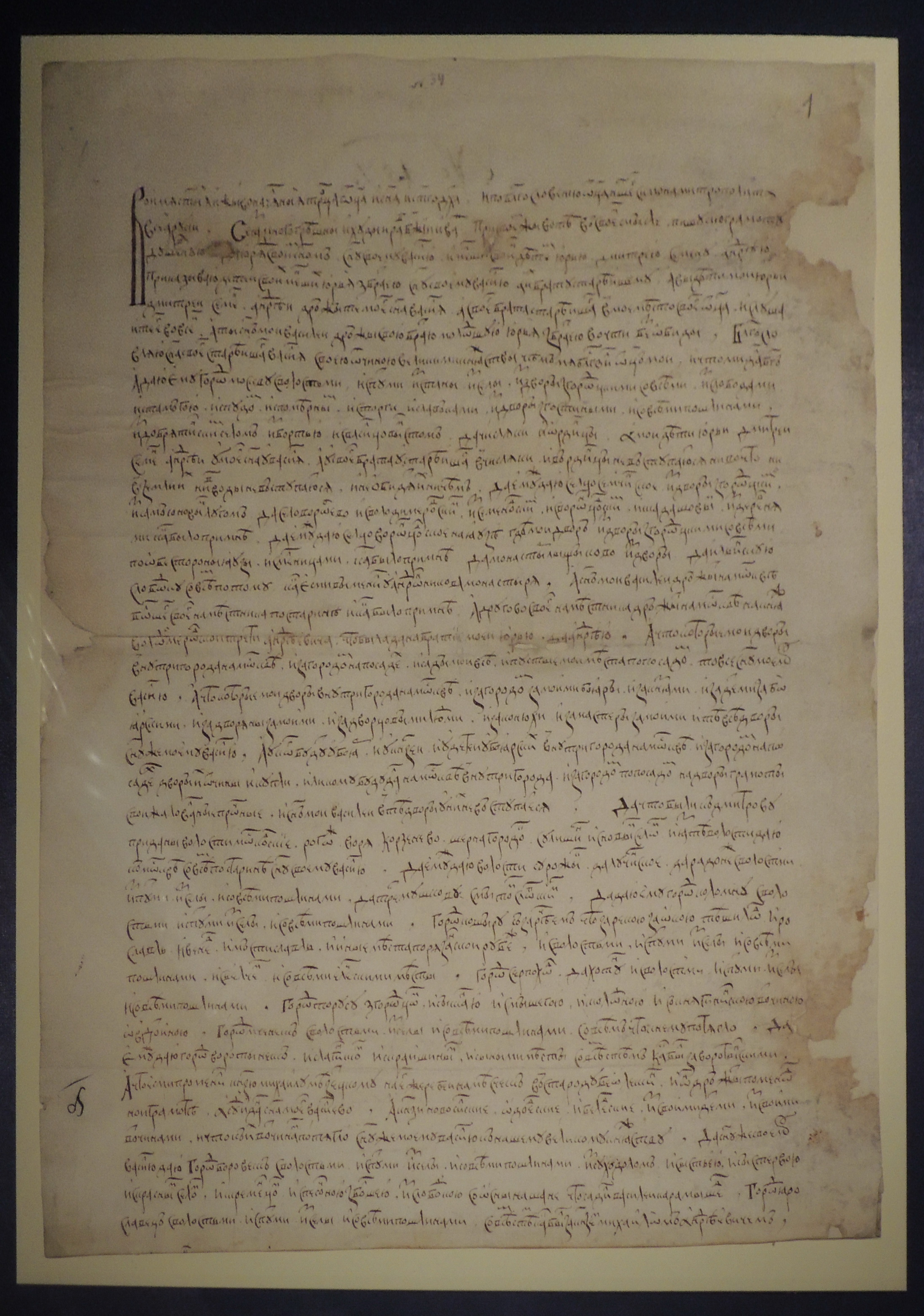 Выставка "Великий князь и государь всея Руси Иван III"